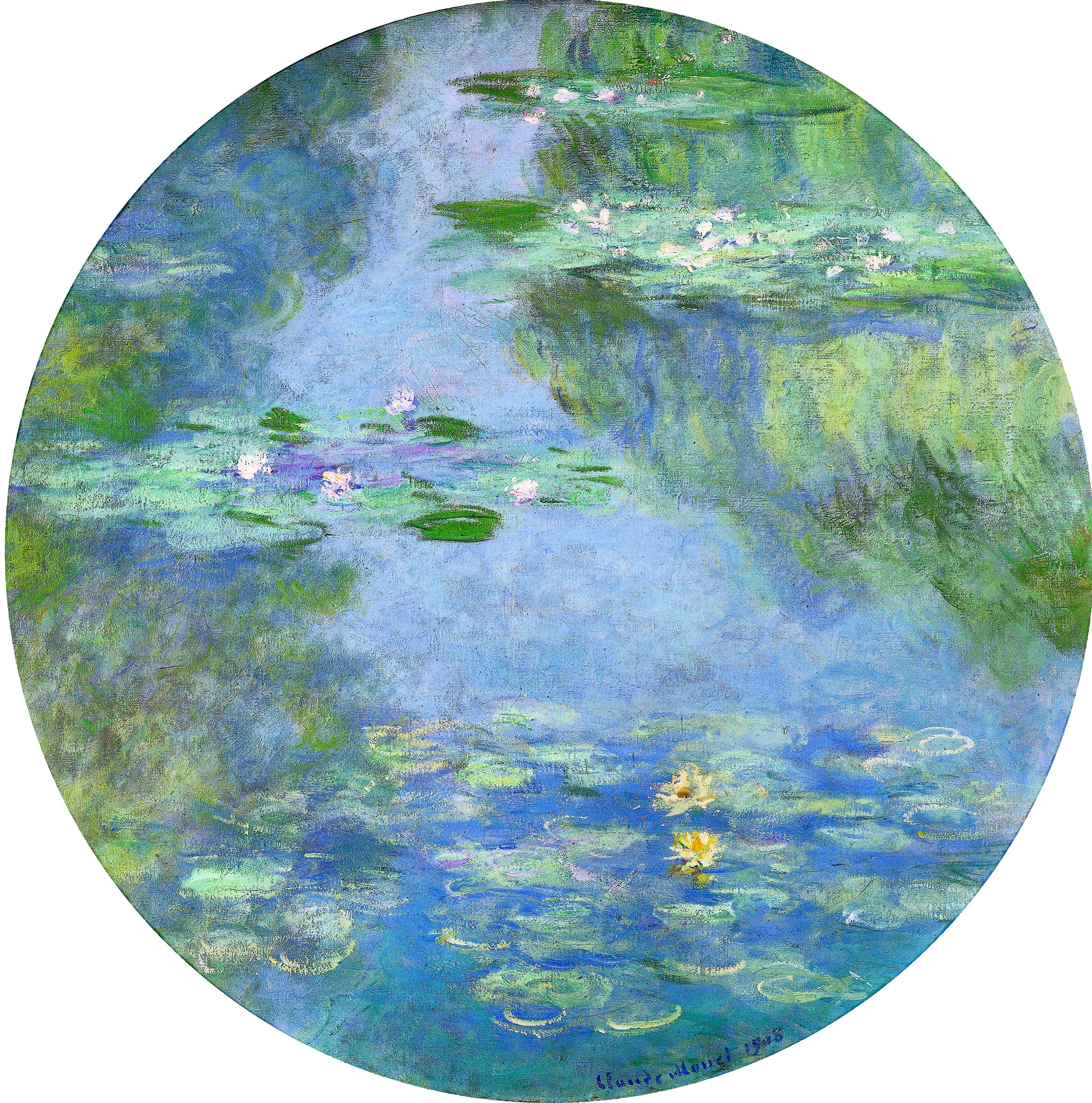 Huile sur toile de Claude Monet - 1908 - Tondo (format circulaire). Musée Alphonse-Georges-Poulain, Vernon (Eure)